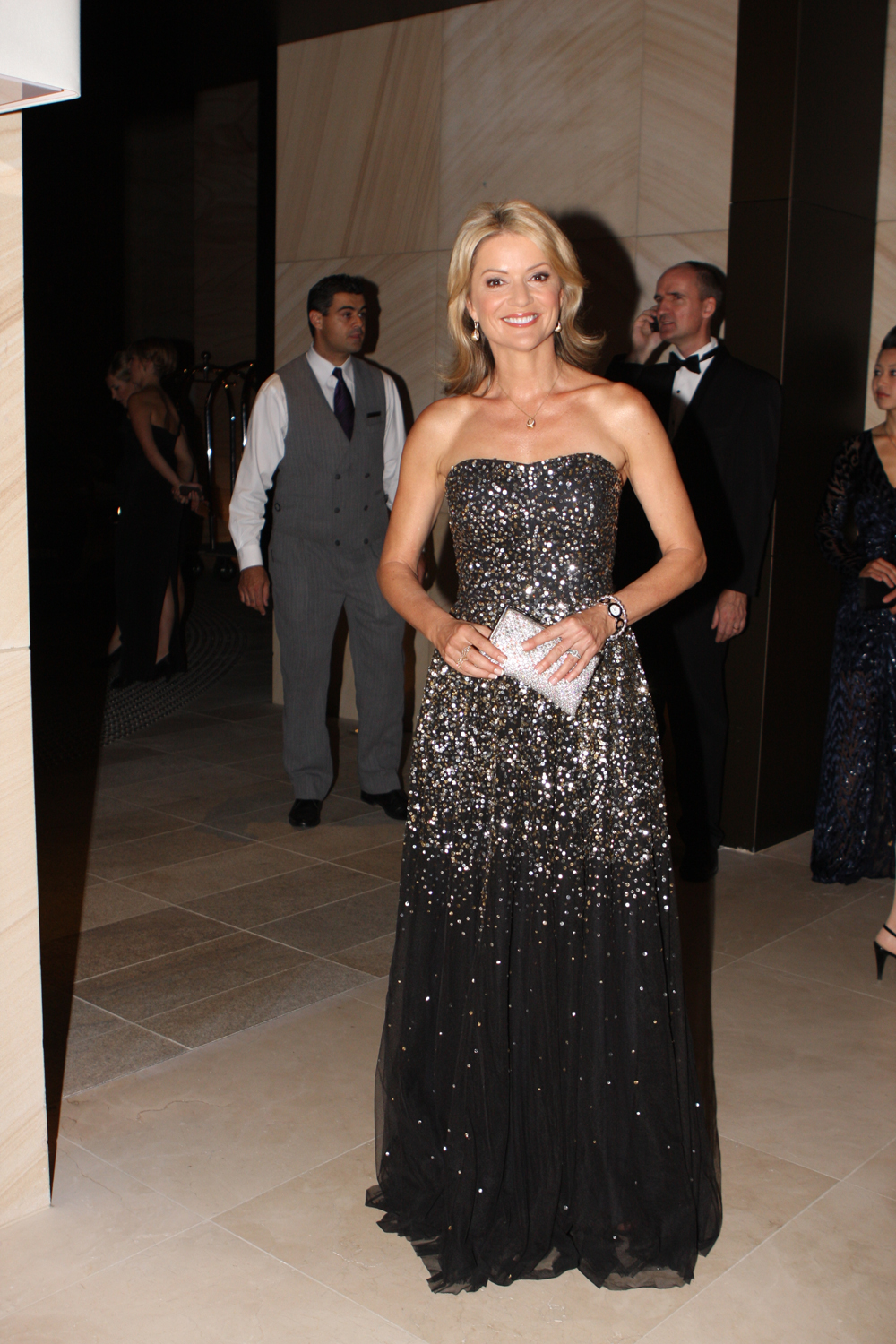 Sandra Sully